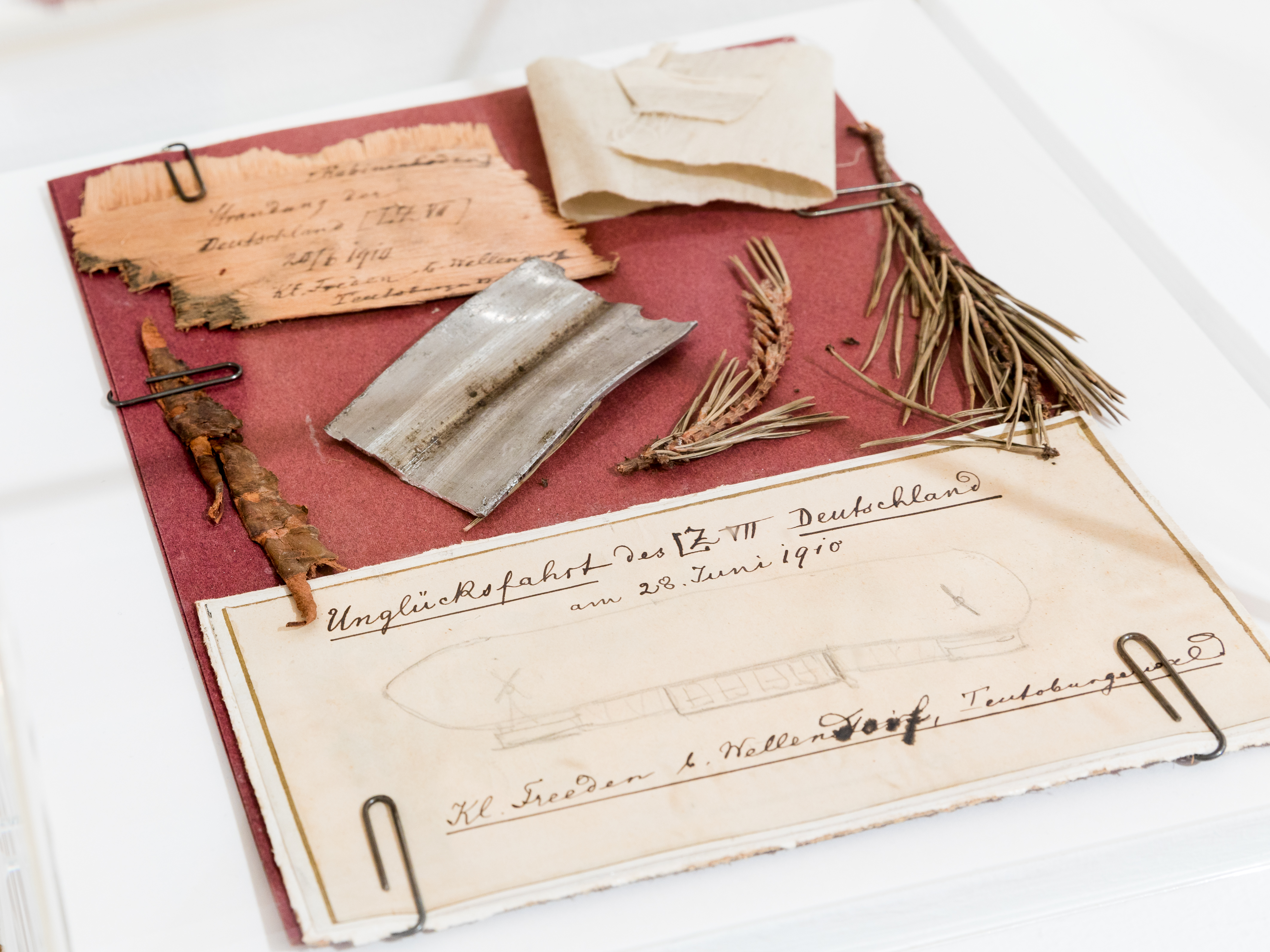 Bretter, die die Welt bedeuten. Spielend durch 2000 Jahre Köln Foto: Devotionalien vom Absturz des Zeppelins „Deutschland“. Zweige und Bruchstücke des Zeppelins LZ 7. Bad Iburg, 28.06.1910. Papier, Holz, Metall, Zweige, Rinde, Seide. Leigabe Stiftung Rheinisch-Westfälisches Wirtschaftsarchiv zu Köln